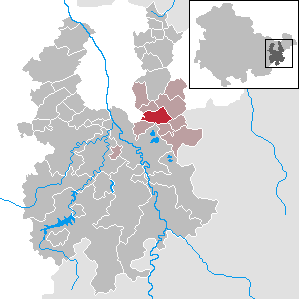 Linda b. Weida in Thuringia - District Greiz